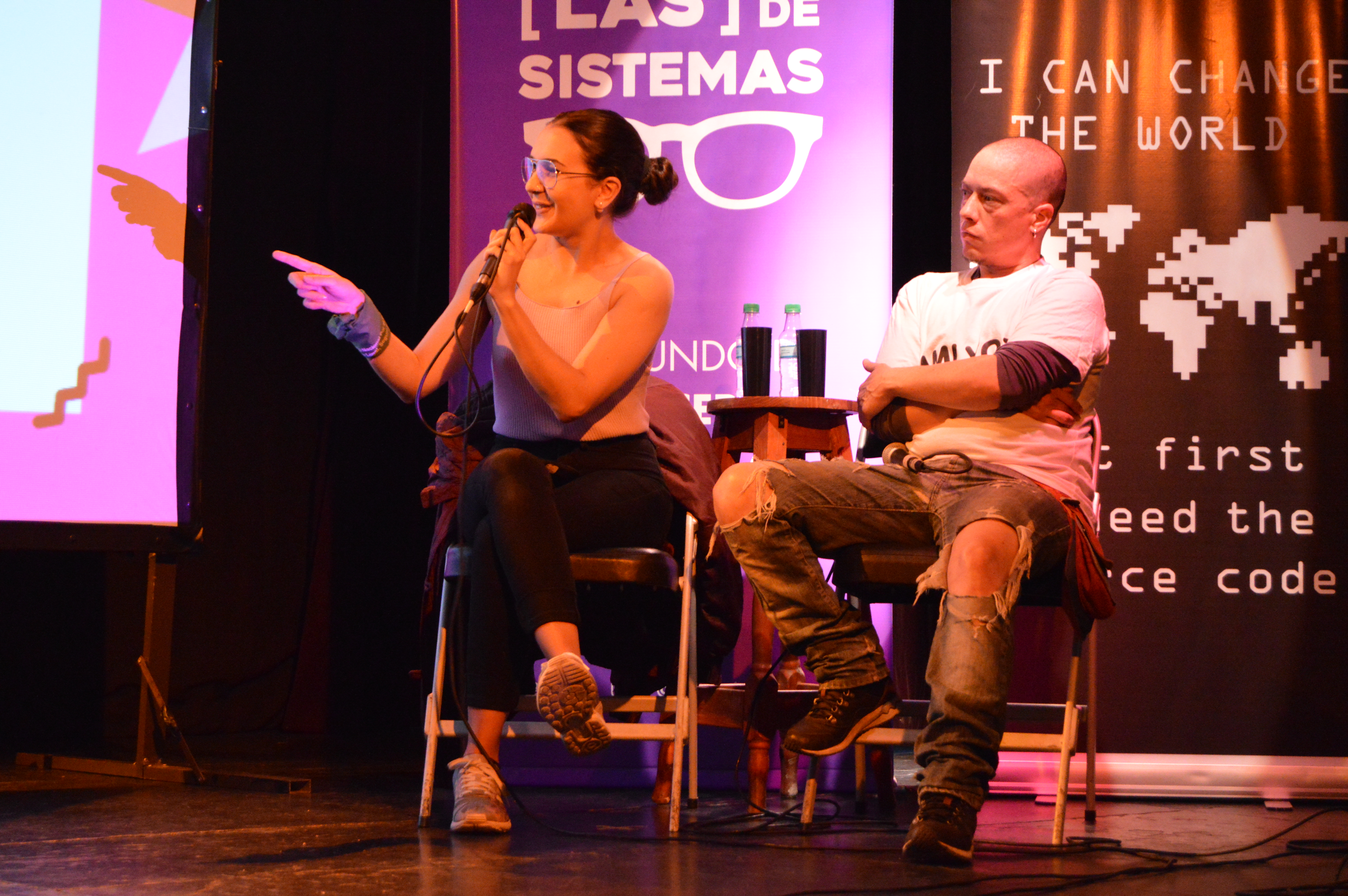 Panel de Genero.